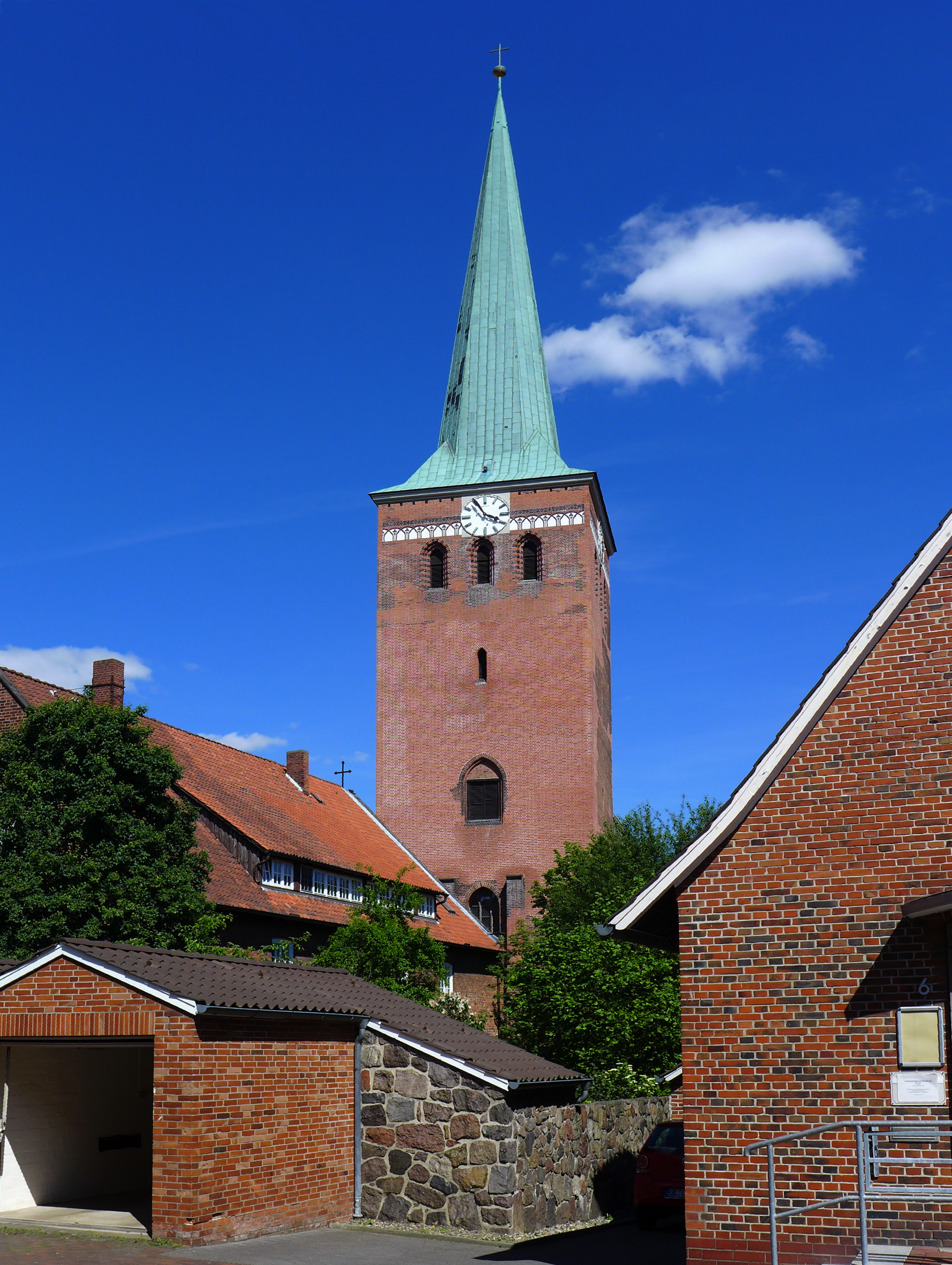 Turm der St. Marien-Kirche in Uelzen, gesehen von der Turmstraße aus. Turmhöhe 86 Meter.